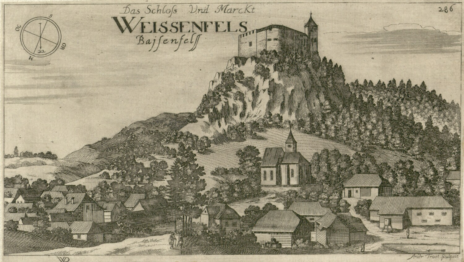 Grad Bela peč